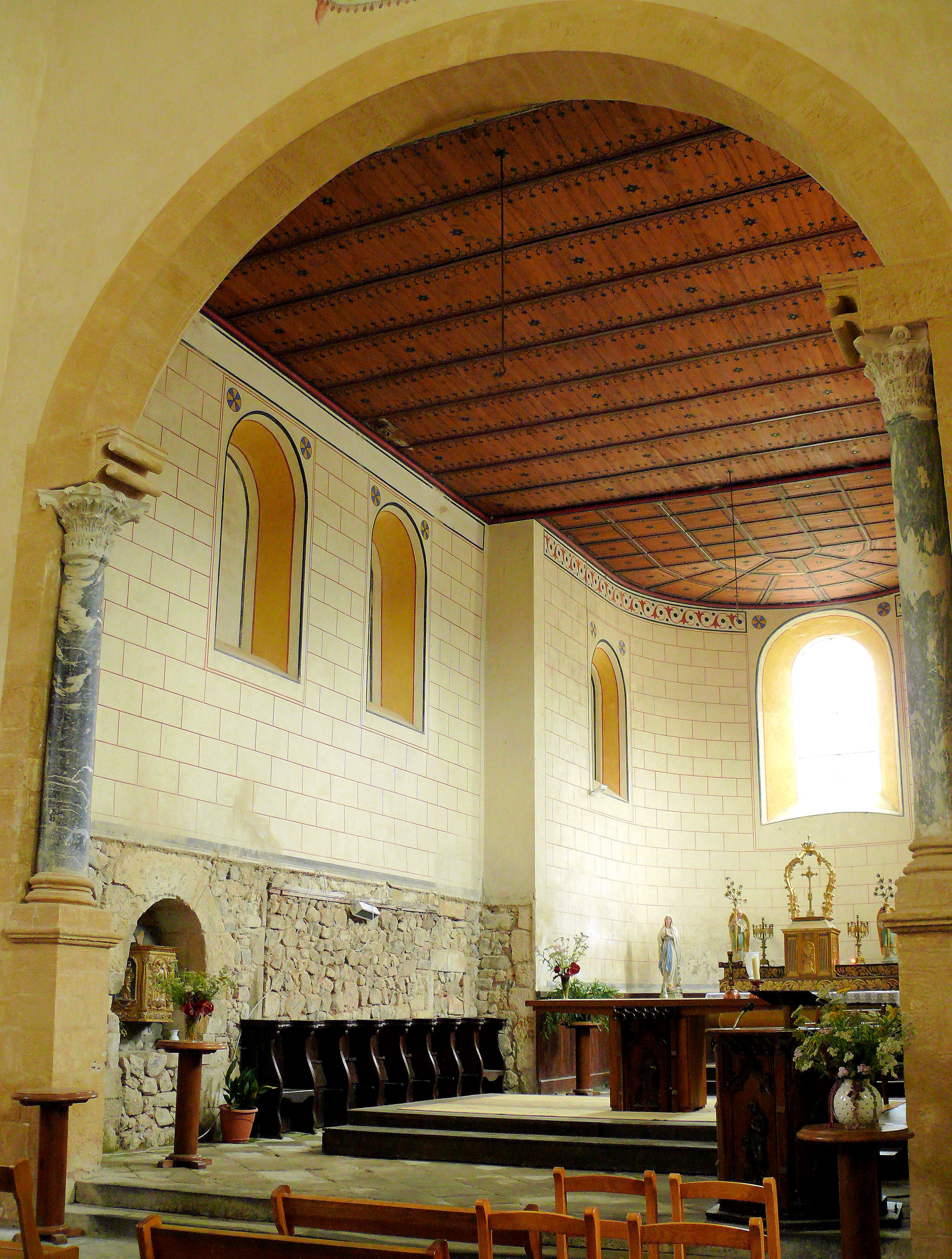 Manglieu - Abbatiale Saint-Sébastien - Arc triomphal, choeur et abside